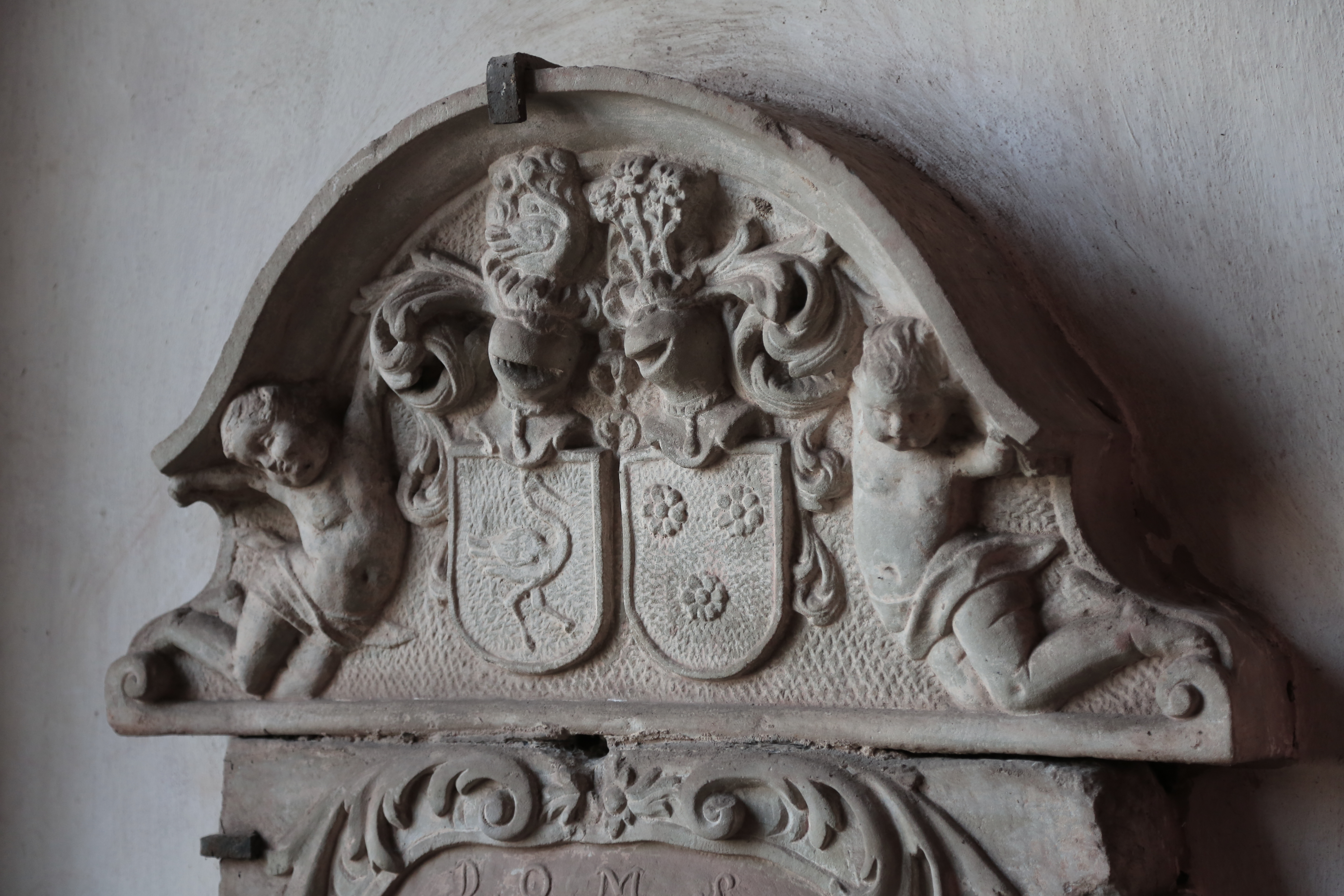 Details am Grabmal von Germanus Lüdke im Dom zu Stendal, Altmark, Deutschland.Links das Wappen Lüdke (des Vaters), Rechts das Wappen Schönebeck (der Mutter).